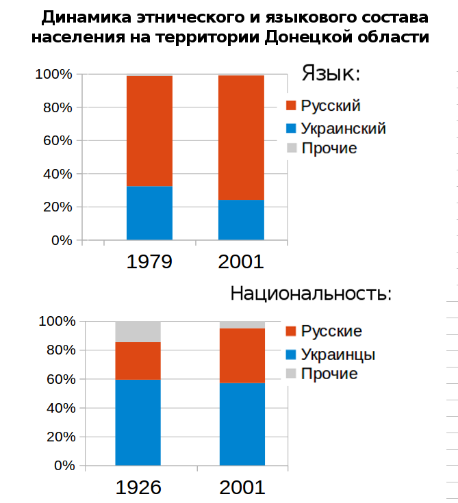 Динамика этнического и языкового состава населения на территории нынешней Донецкой области (Украина). Источники данных: Про кількість та склад населення Донецької області за підсумками Всеукраїнського перепису населення 2001 року Численность и состав населения СССР: по данным Всесоюзной переписи населения 1979 года. Центральное статистическое управление СССР, 1984 Всесоюзная перепись населения 1926 года. Том .XI-XIII Украинская ССР - М.: Изд-е ЦСУ Союза ССР. Первая всеобщая перепись населения Российской Империи 1897 г. Распределение населения по родному языку и уездам 50 губерний Европейской России. Пірко В. О. Заселення Донеччини у ХYІ-ХYІІІ ст. — Донецьк: Східний видавничий дім. НТШ-Донецьк. — 2003. — 182 с.